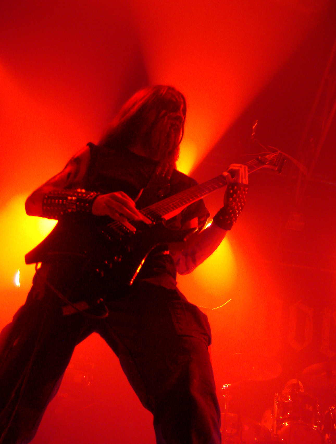 Gorgoroth, concert du 20/11/07 à la Locomotive à Paris.Sykelig.